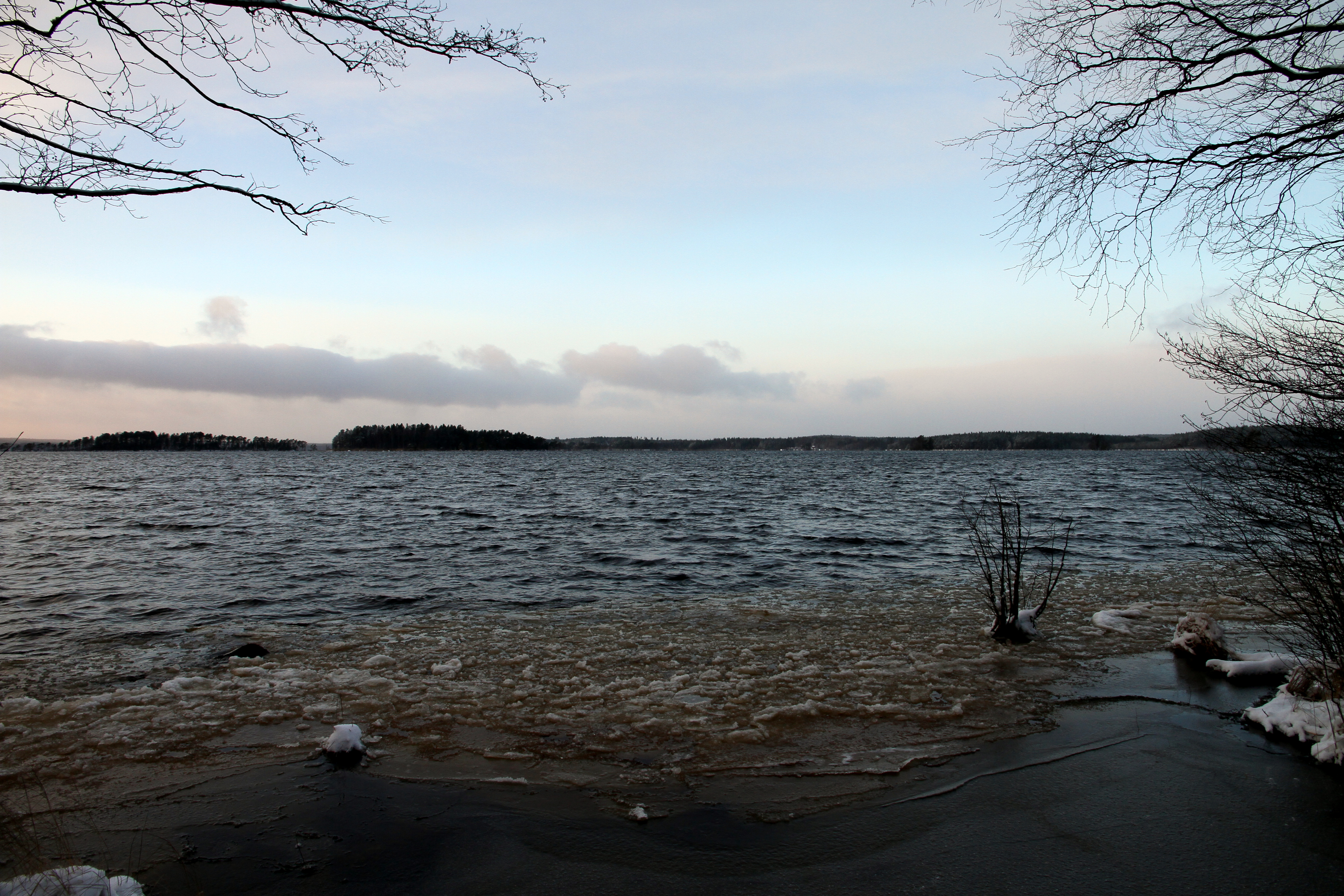 Foto av sjön Toften, taget vid sundet mellan Toften och Testen.